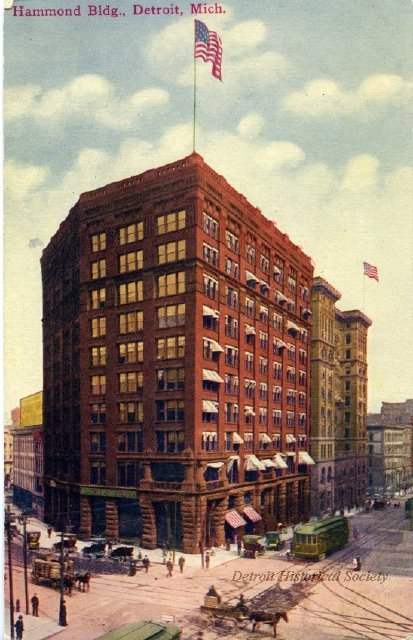 Hammond Building ansicht